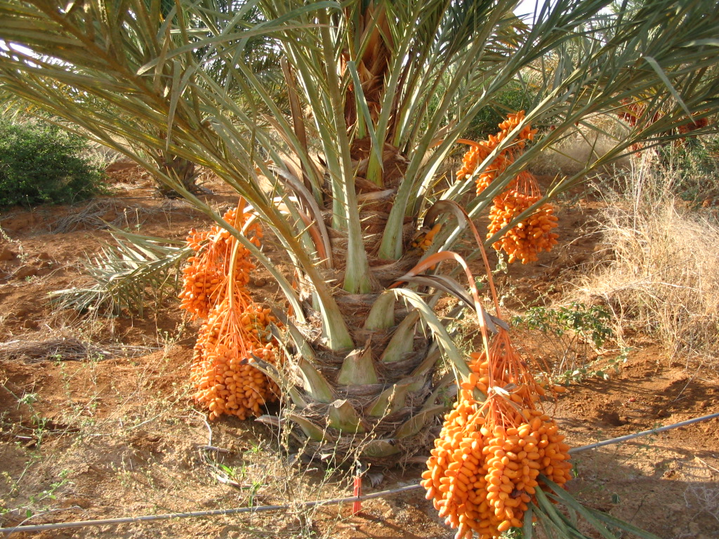 Date Palm ("Tamareira") from Fazenda Terra in Bahia, Brasil